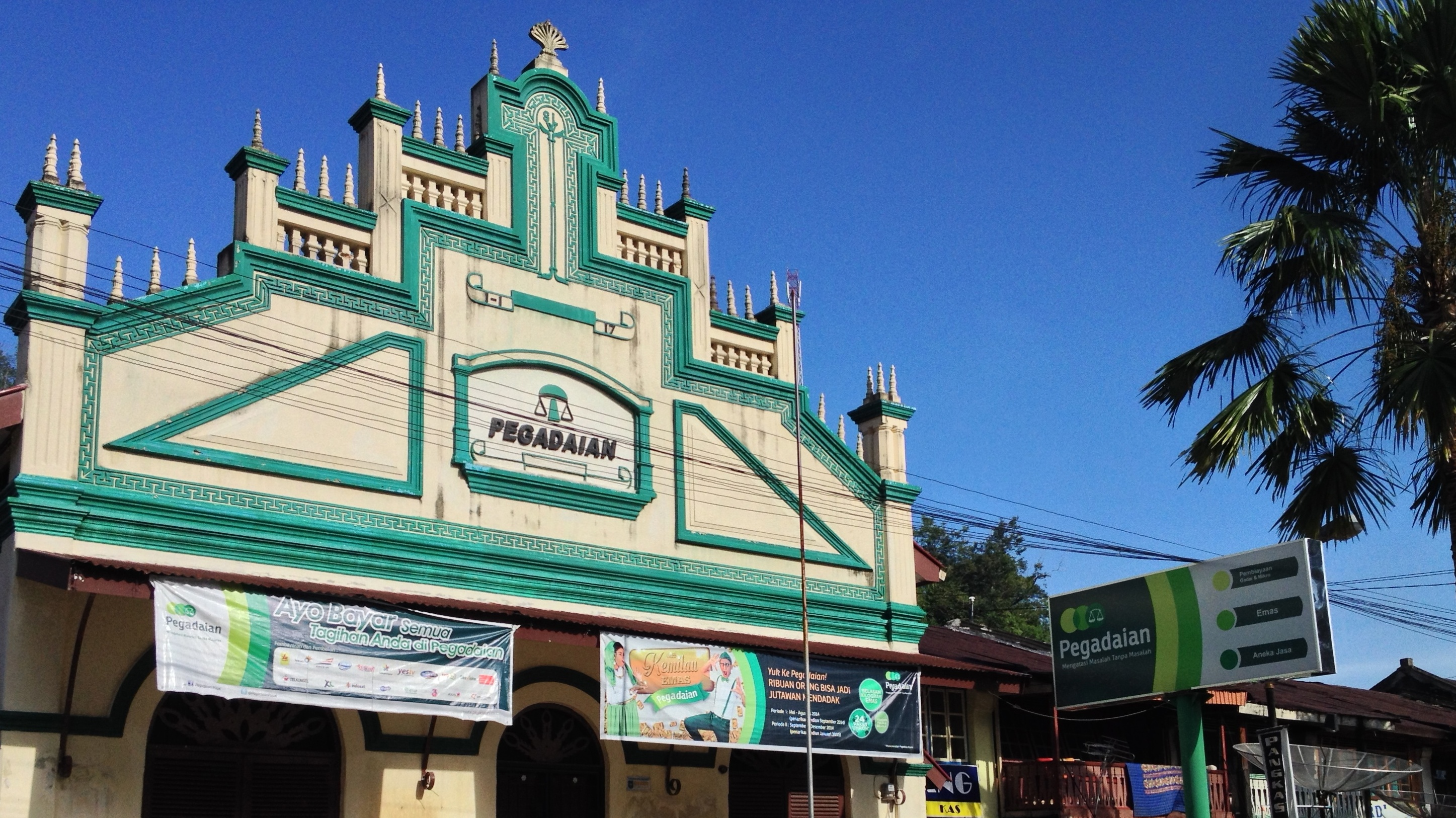 Sawahlunto